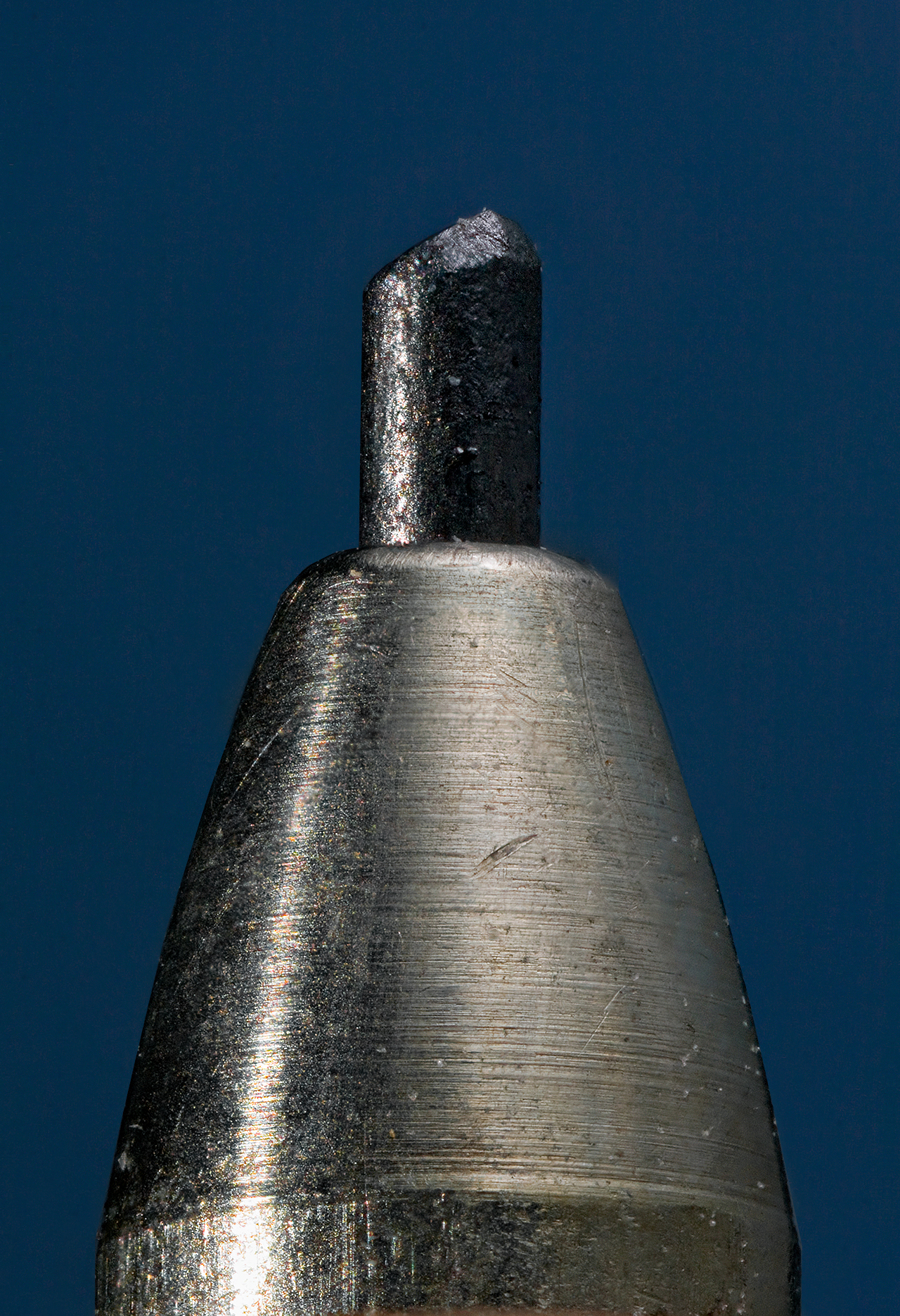 0.5mm Pacer